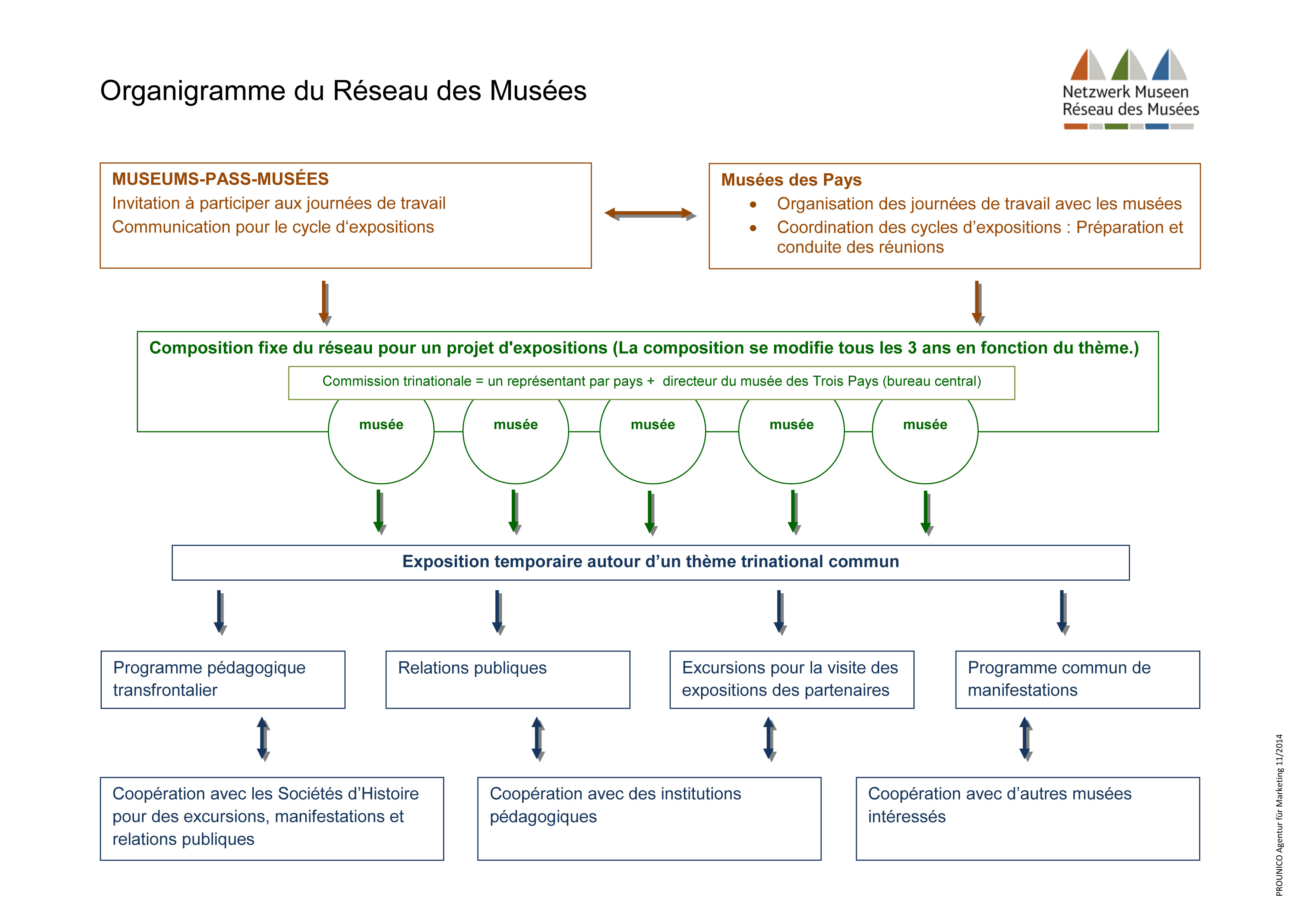 Organigramm Netzwerk Museen